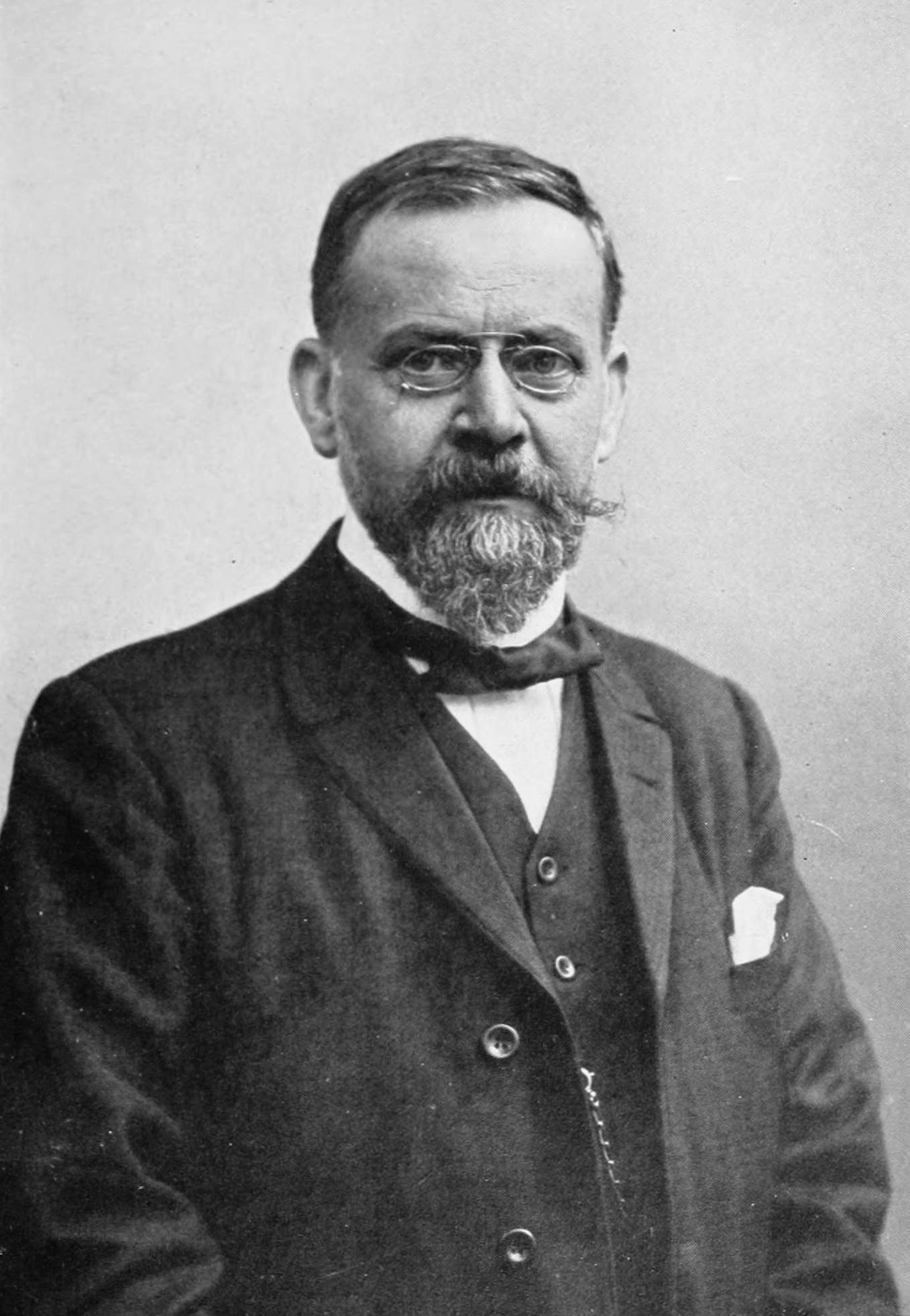 Jules Feller, Notes de philologie wallonne (1912)